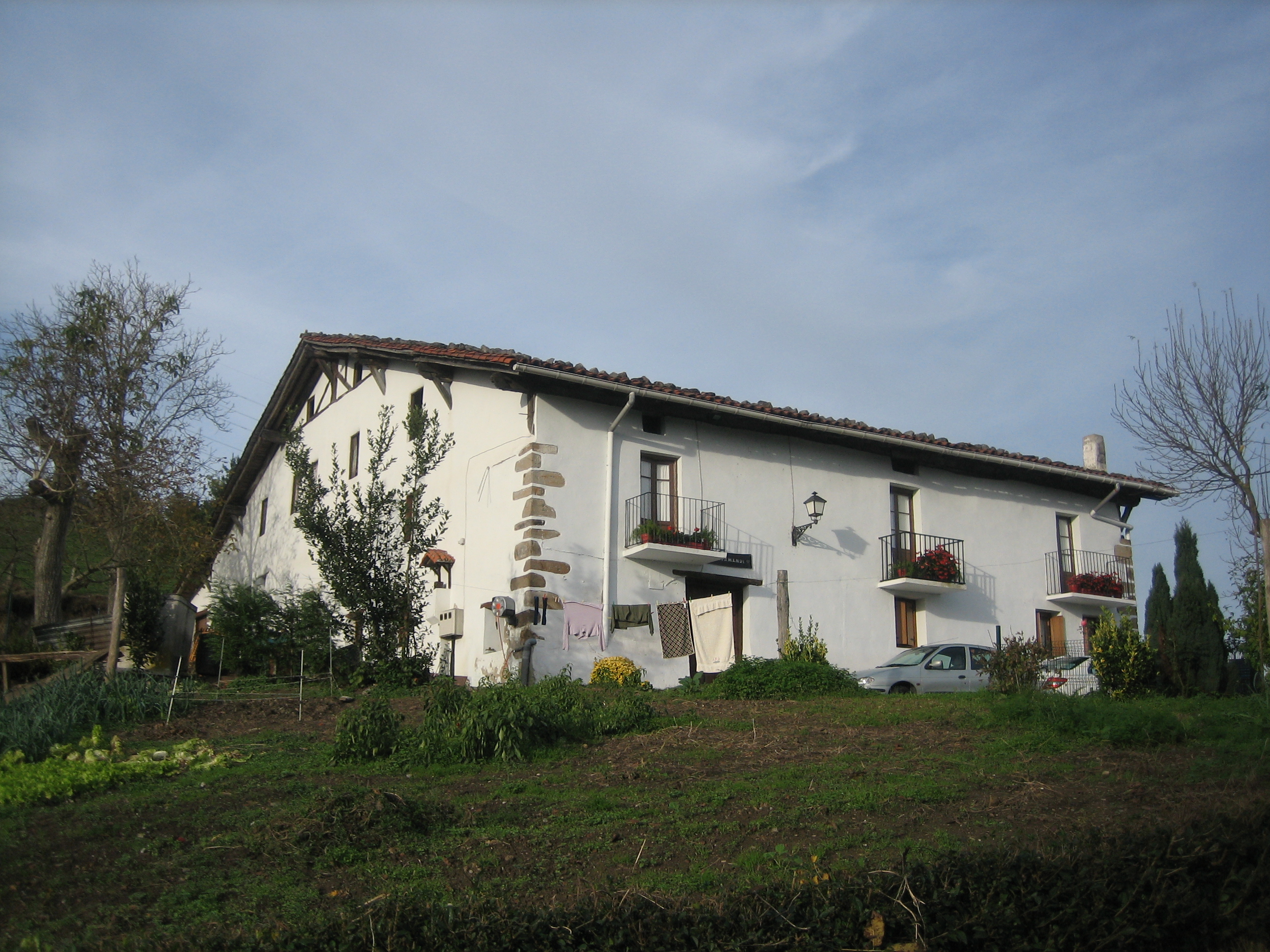 Letamendi baserriaren ikuspegi orokorra.